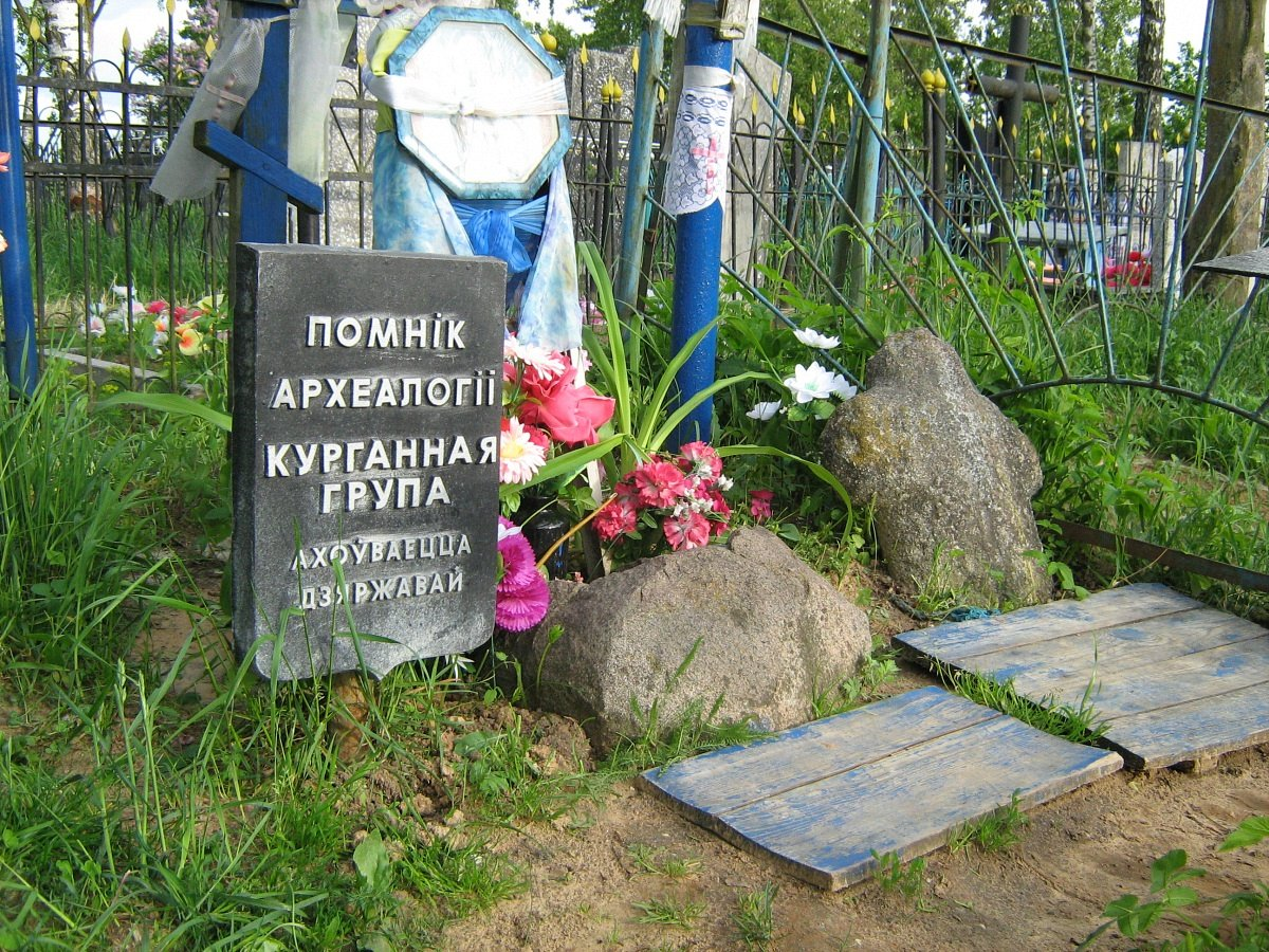 Верхлес. Камень-следавік на могілках This is a photo of Belarusian heritage monument. Reference number: 613В000638 ( WLM)